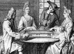 Fragment du frontispice du traité sur le jeu de trictrac (chez Charpentier, 1715). Gravure de Tardieu. Provenance : Philippe Lalanne (scan d'un ouvrage personnel) Philippe Lalanne 15 janvier 2006 à 19:37 (CET)